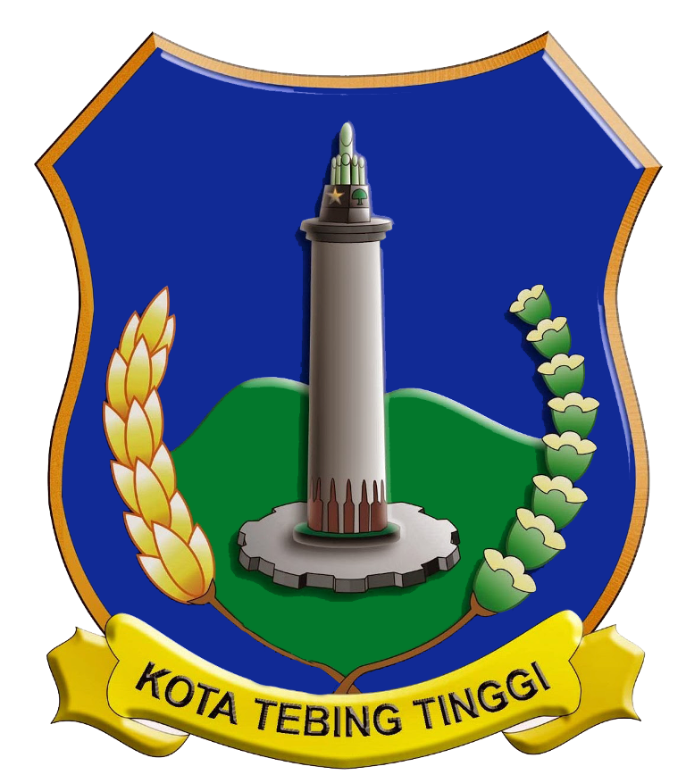 Tebing Tinggi city armcoats, Sumatra, Indonesia